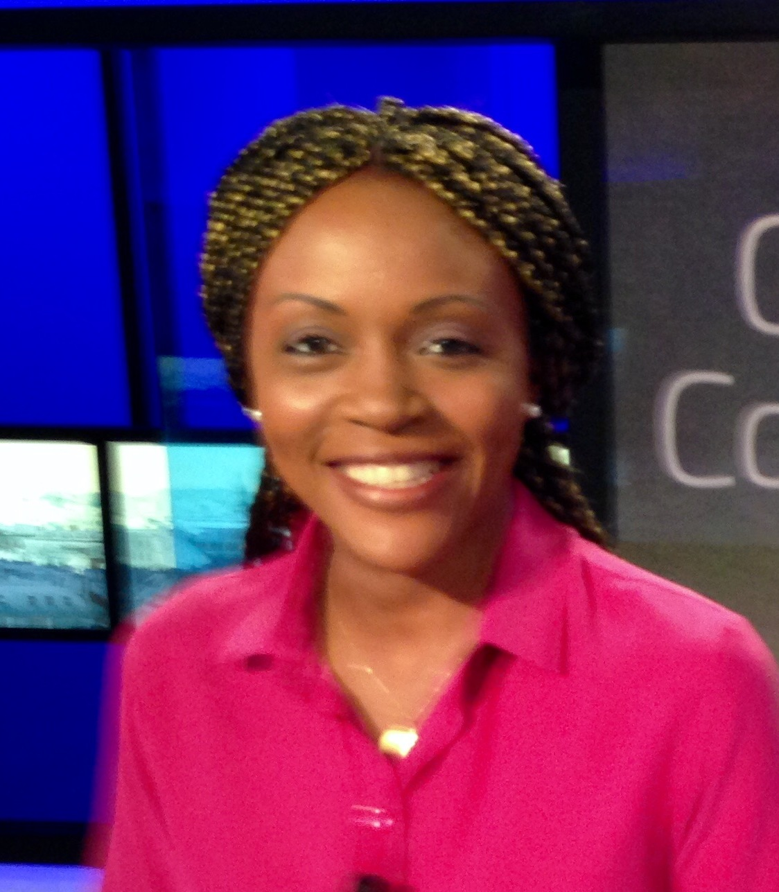 Promotion du livre de photos "Congo Couleur Nuit"